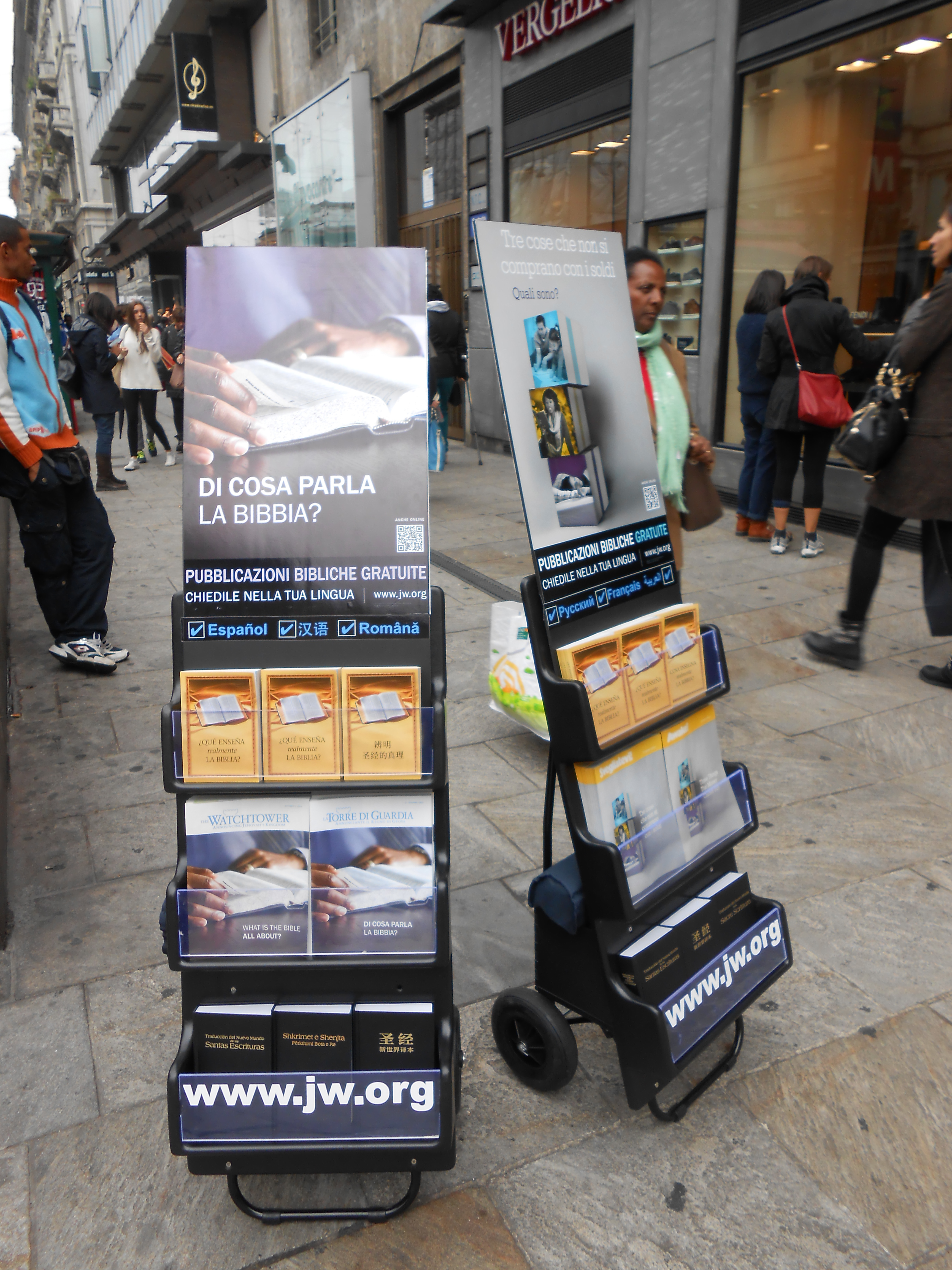 Milano - Corso Buenos Aires - Una delle principali vie della città. I testimoni di Geova predicano anche utilizzando gli espositori mobili